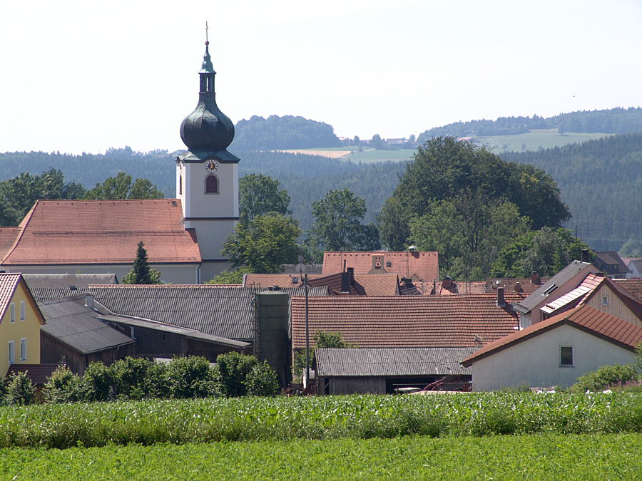 Blick auf Konnersreuth Fotograf: Walter J. Pilsak, Waldsassen Copyright Status: GNU Freie Dokumentationslizenz